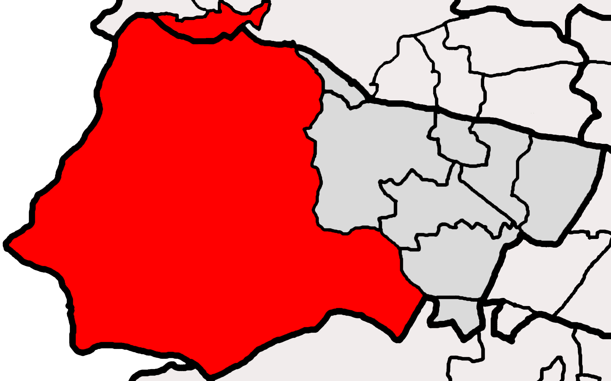 Positionskarte der Wiener Katastralgemeinde Auhof im Gemeindebezirk Hietzing